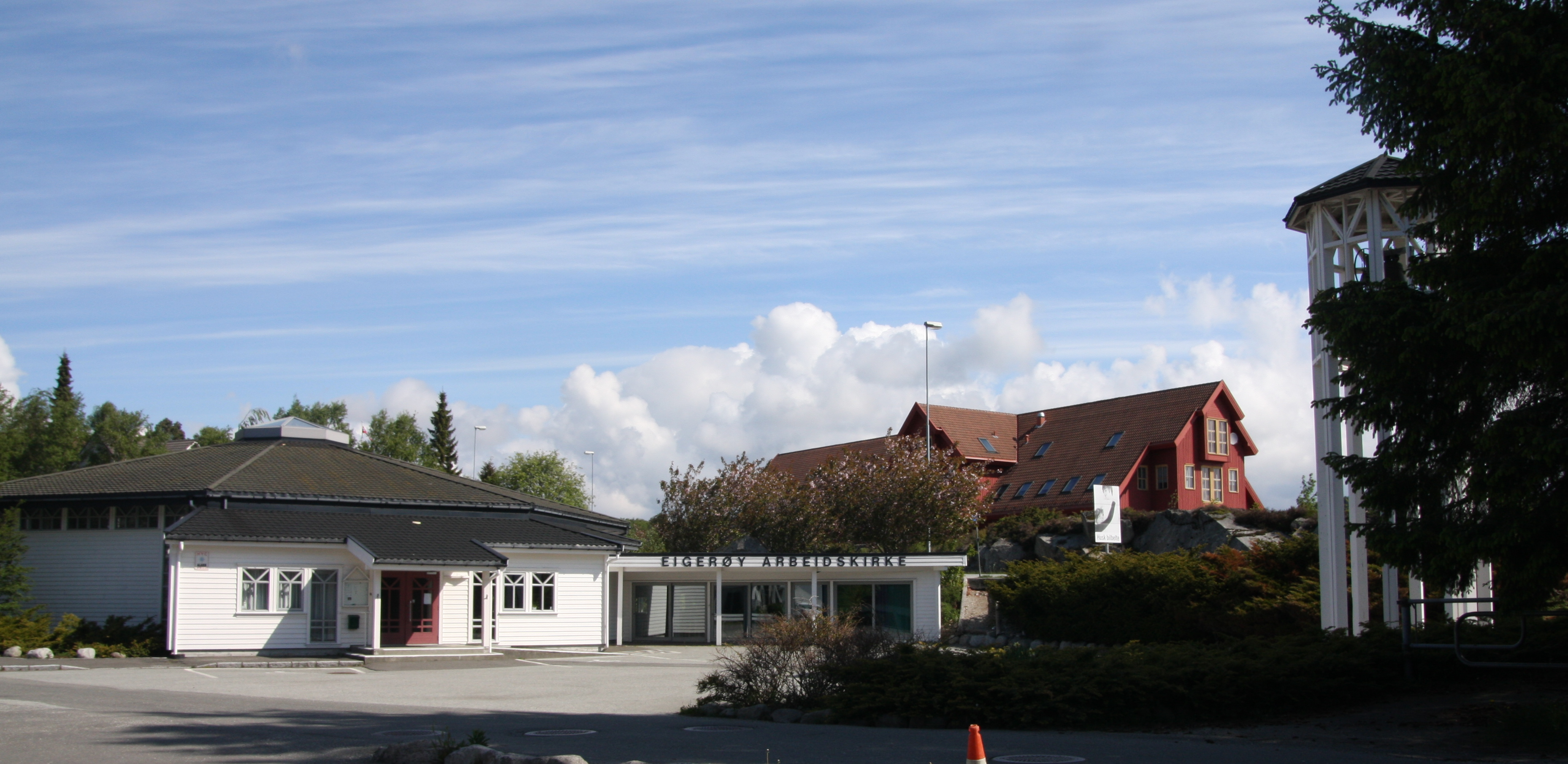 Eigerøy kirke